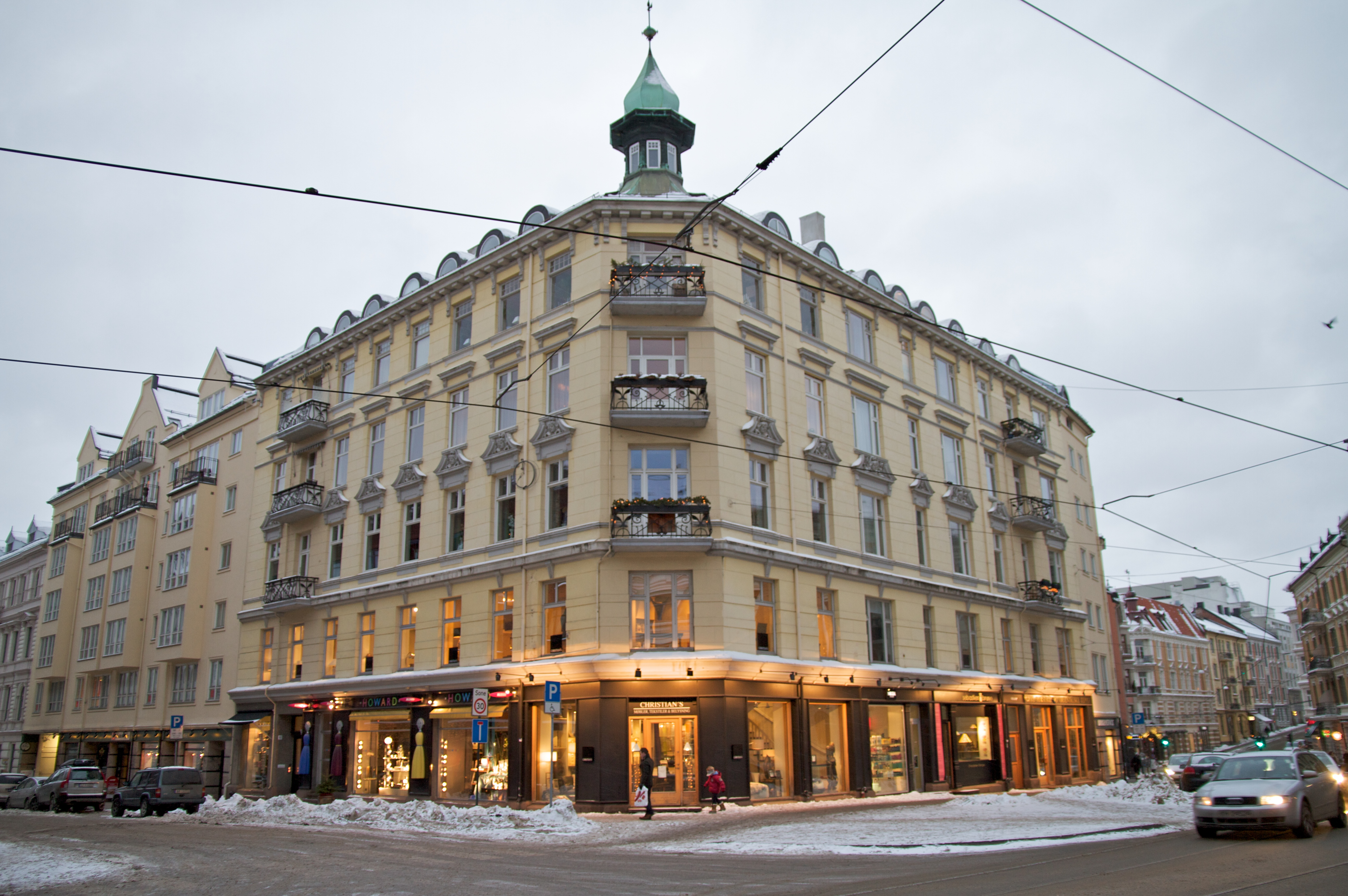 Skovveien 6 i Oslo.